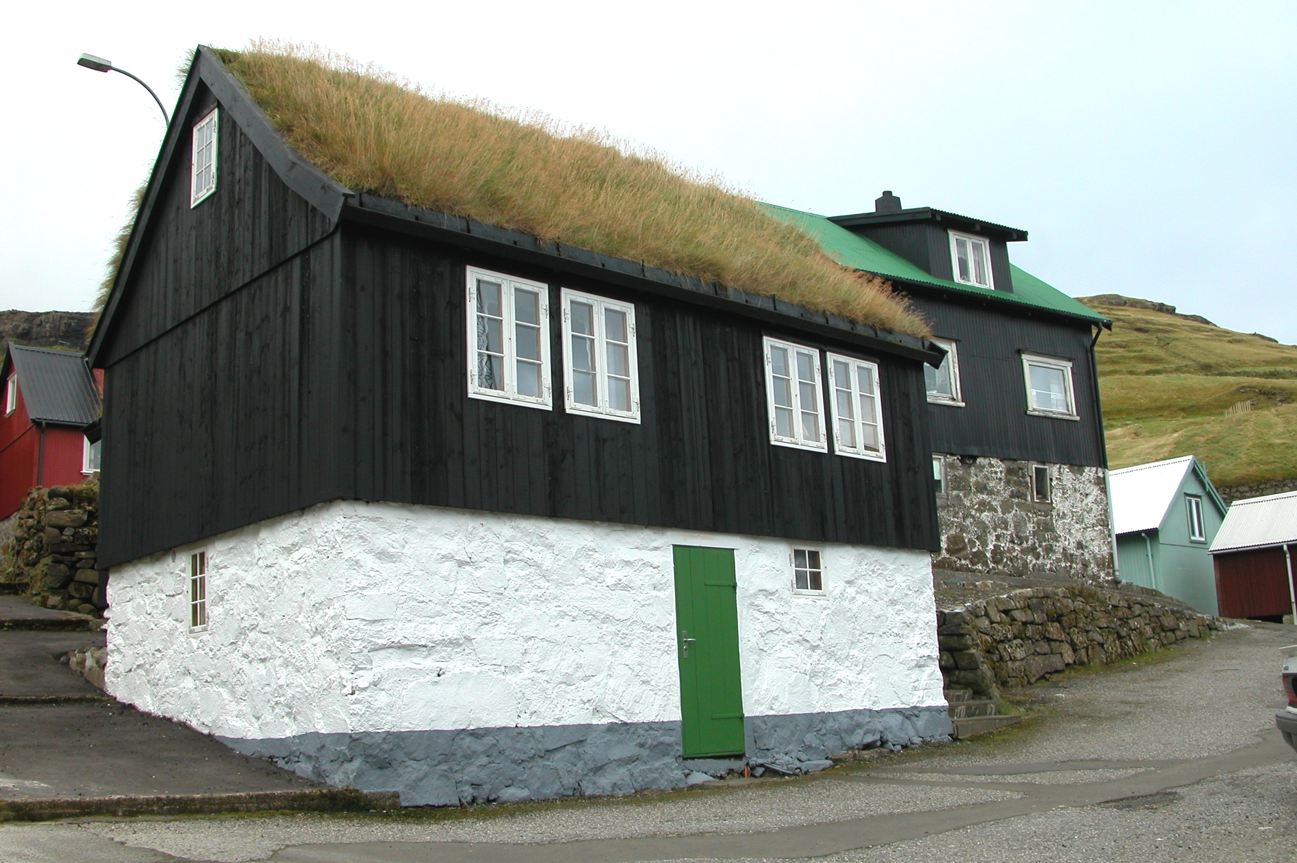 Haldarsvík on Streymoy, Faroe Islands